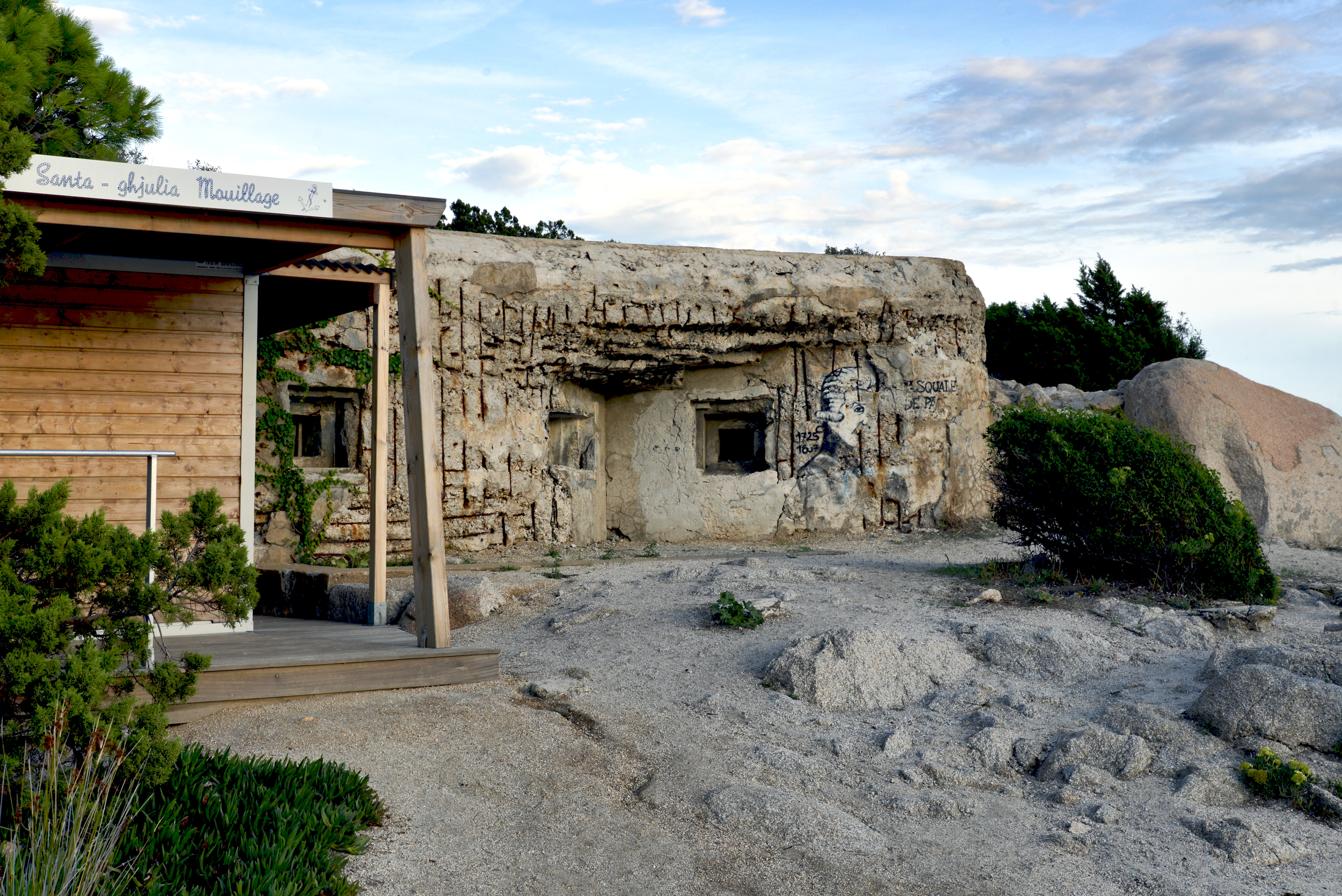 Porto-Vecchio, Freto (Corse-du-Sud) - Le blockhaus de Santa Giulia, ouvrage de la ligne Maginot dans l'organisation défensive de la Corse.